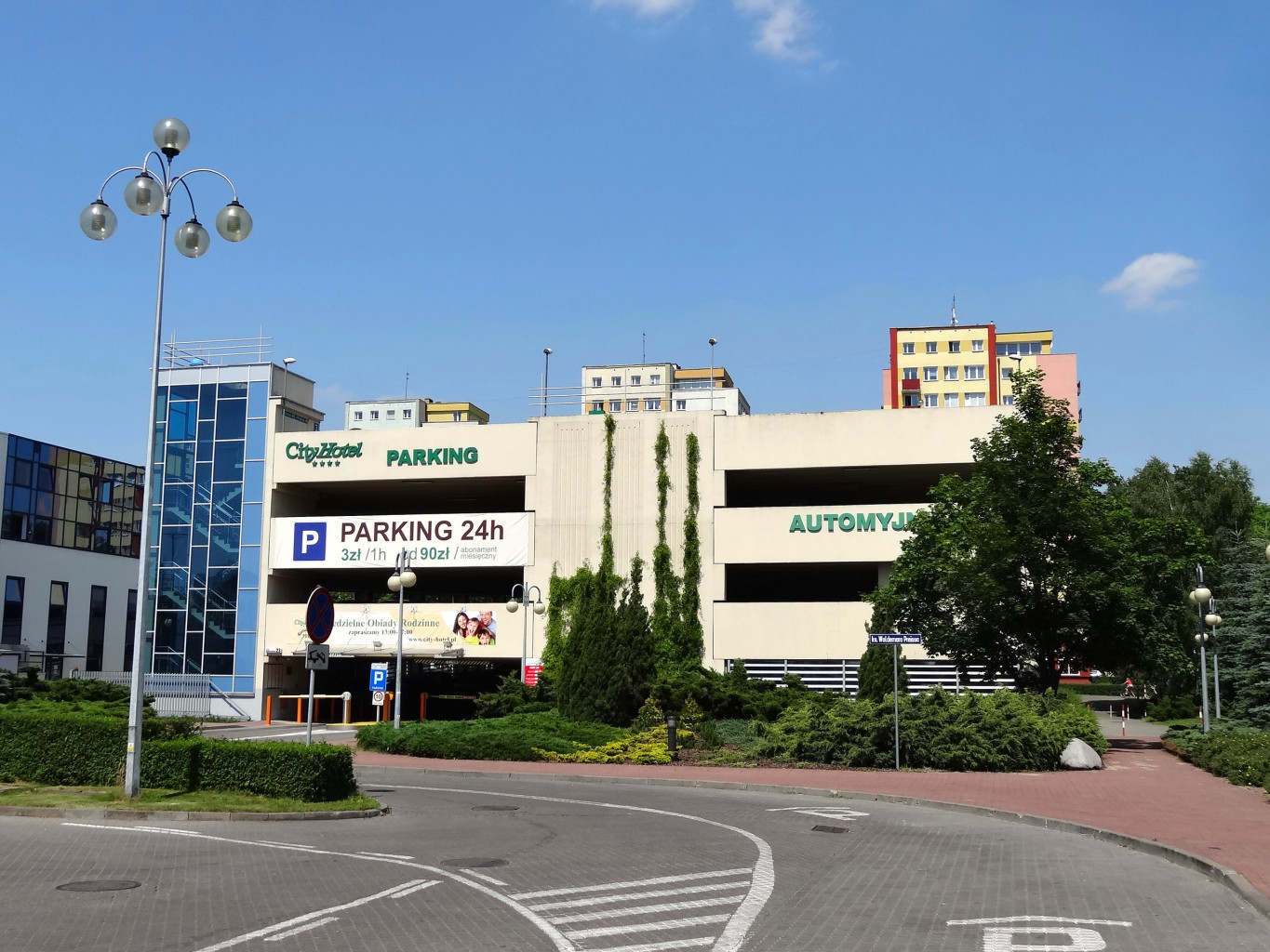 Parking wielopoziomowy Autopark Bydgoszcz